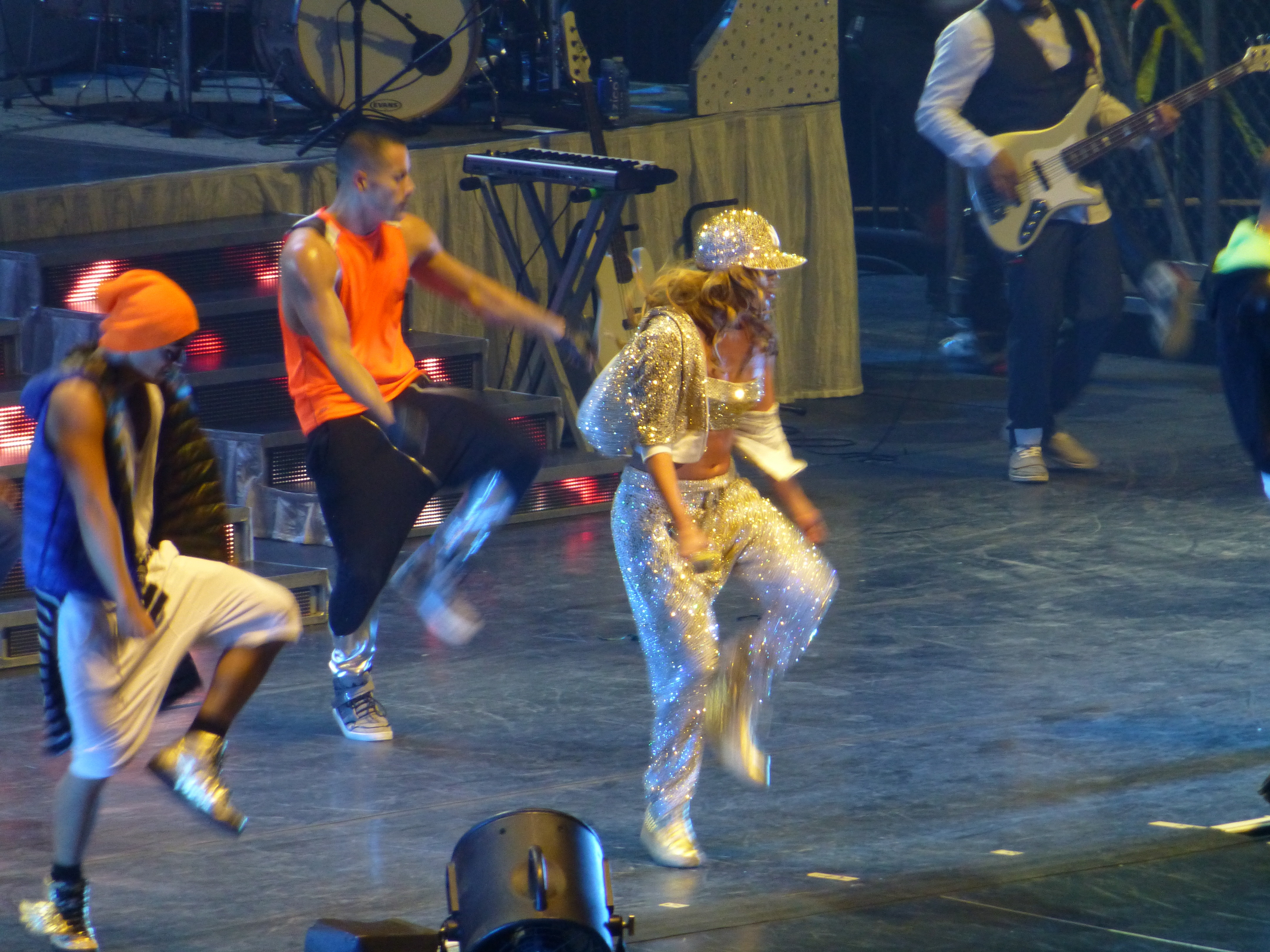 Jennifer LOPEZ en concert à Paris Bercy dans le cadre du " DANCE AGAIN WORLD TOUR " en OCTOBRE 2012